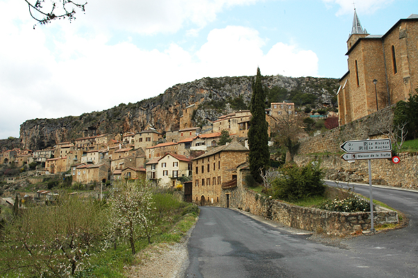 Peyre. Gran parte de este pueblo está excavado en la roca